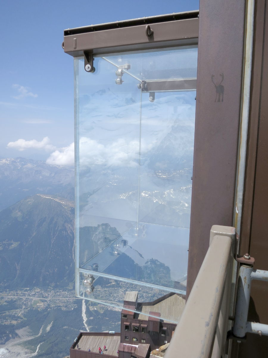 Le Pas dans le vide à l'aiguille-du-Midi, Chamonix